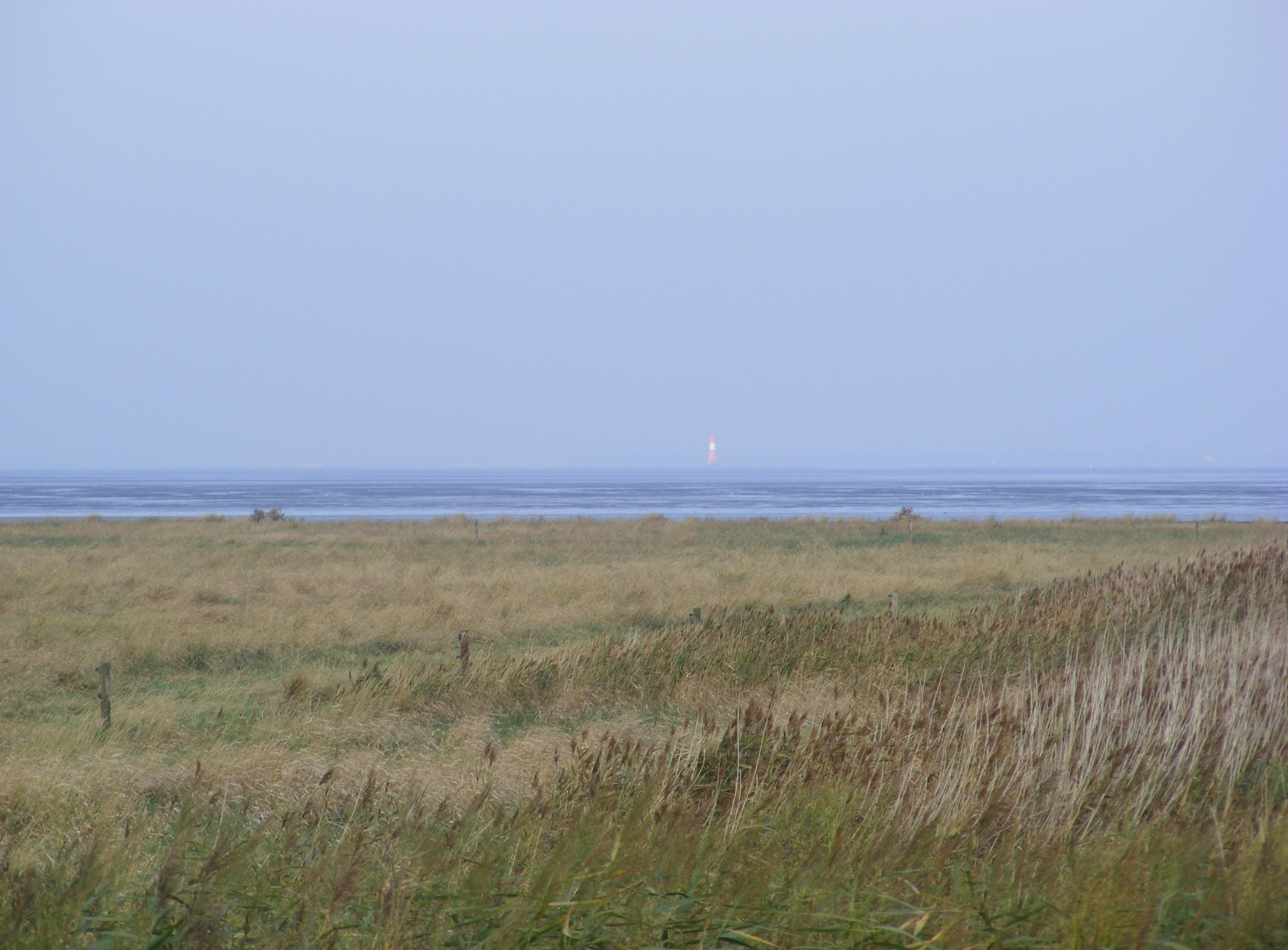 Jadebusen: Salzwiesen bei Seefeld und Leuchtturm Arngast